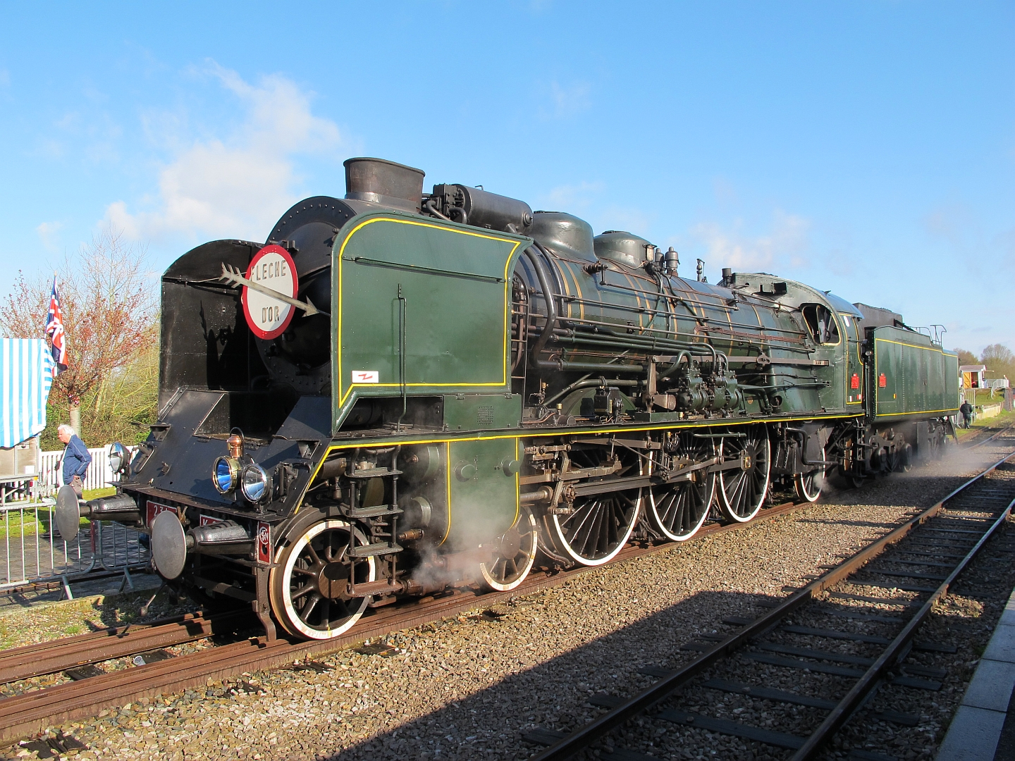 La 231 K 8 en gare de Noyelles sur le chemin de fer de la baie de Somme le 16 avril 2016.